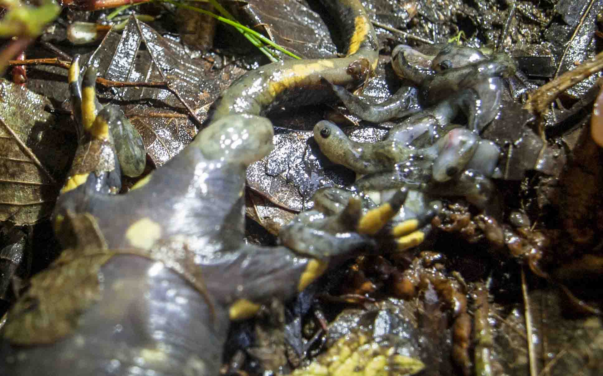 Cette salamandre à été trouvée à une vingtaine de mètre de la source située en contrebas du château de Commarque, au pied de la ligne de falaise conduisant à l'entrée du site. Elle se trouvait sur le dos, vivante et donnant naissance à de jeunes larves, qui, contrairement à certaines espèces vivipares, n'étaient pas en mesure de survivre hors d'un milieu aquatique. Quelques temps plus tard, j'ai retrouvé le cadavre de la salamandre dans la même position. J'en conclu donc que l'animal, pour une raison inconnue, a été contraint de donner naissance à ses petits de façon prématurée. La ligne de falaise étant longée par le chemin menant les touristes au château, il est possible qu'elle ait été heurtée par un marcheur, bien qu'aucun traumatisme n'ait été apparent (j'ai, un instant, remis l'animal sur pattes et il se déplaçait convenablement).